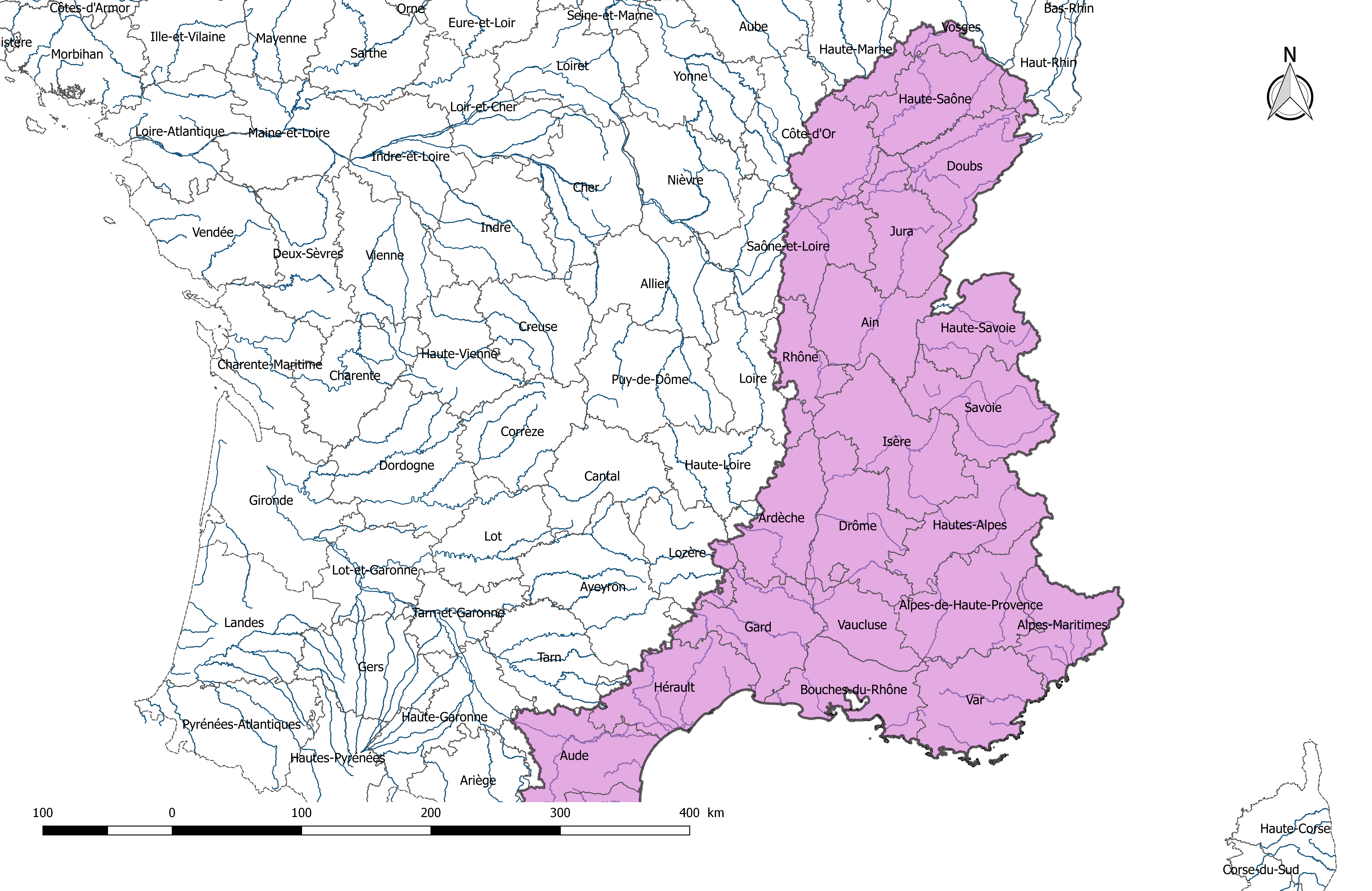 Carte de la circonscription de bassin Rhône-Méditerranée en France, avec les départements qui la composent.